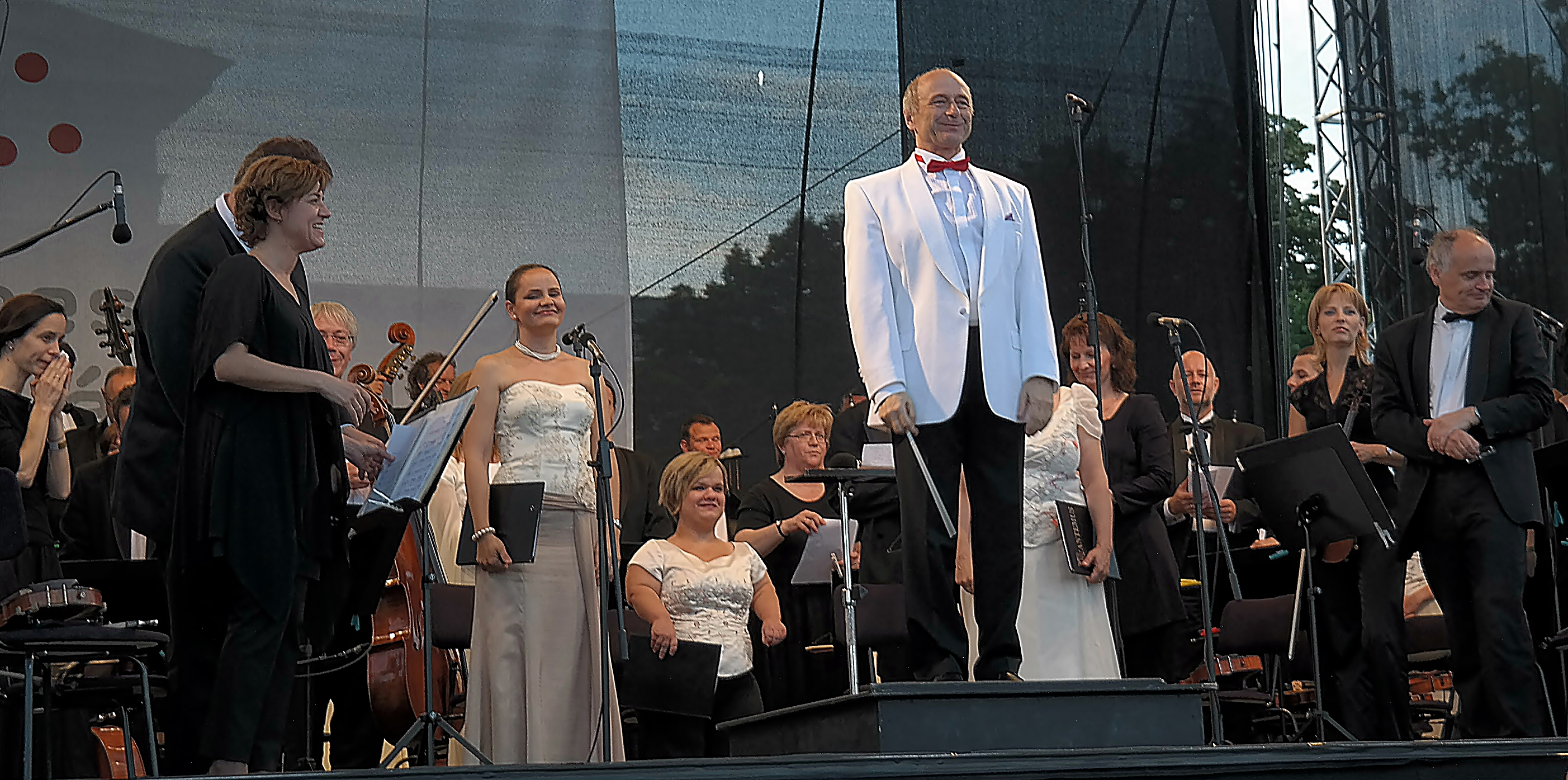 Budapesti Fesztiválzenekar a TérTánc koncerten, középen Fischer Iván (Budapest, Hősök tere)